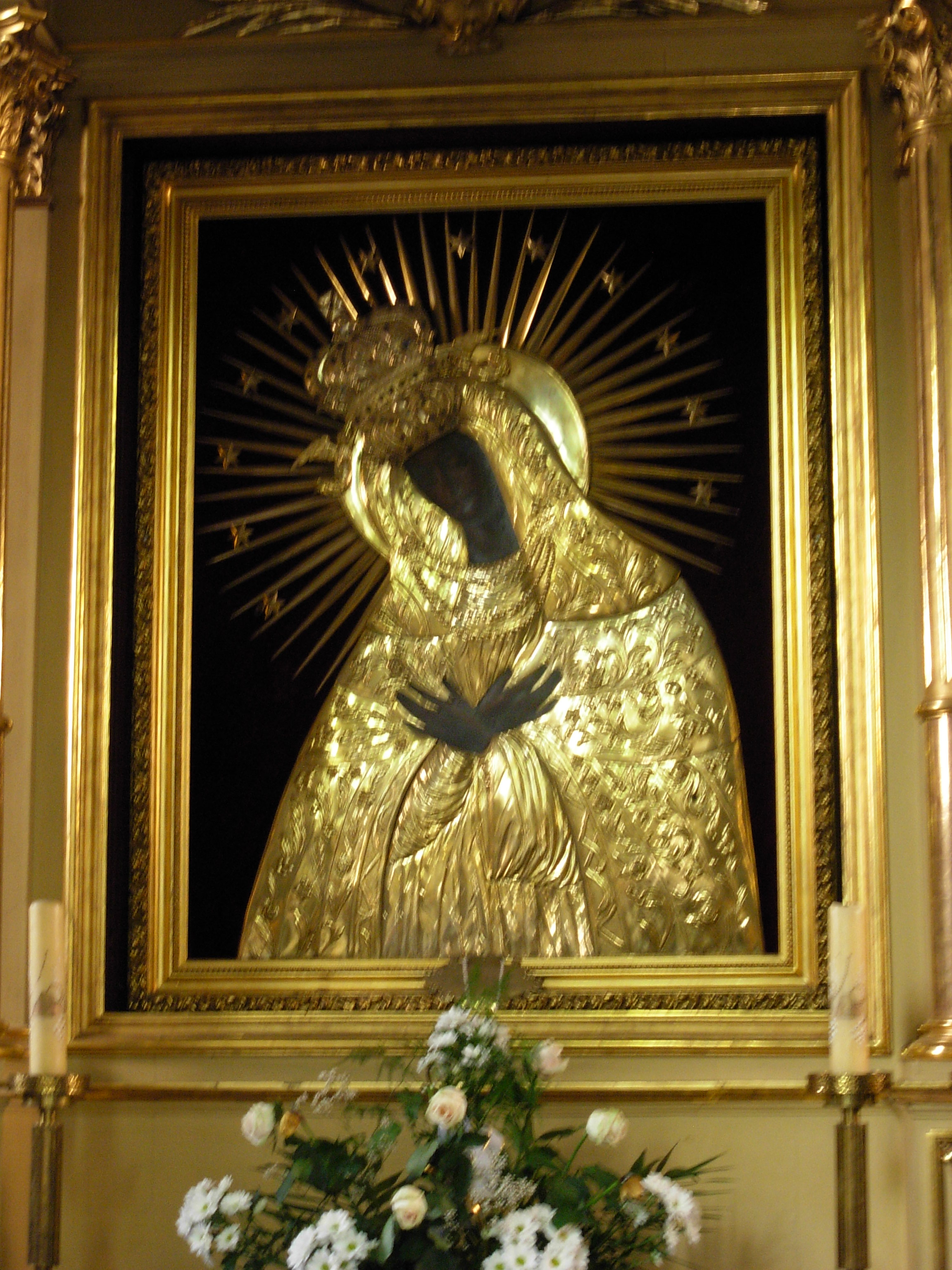 Sandomierz Cathedrali Sandomierz, Poland.